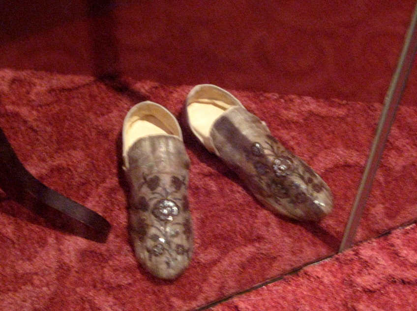 Домашние тапочки Павла I. Выставка "Павел I", Царицыно